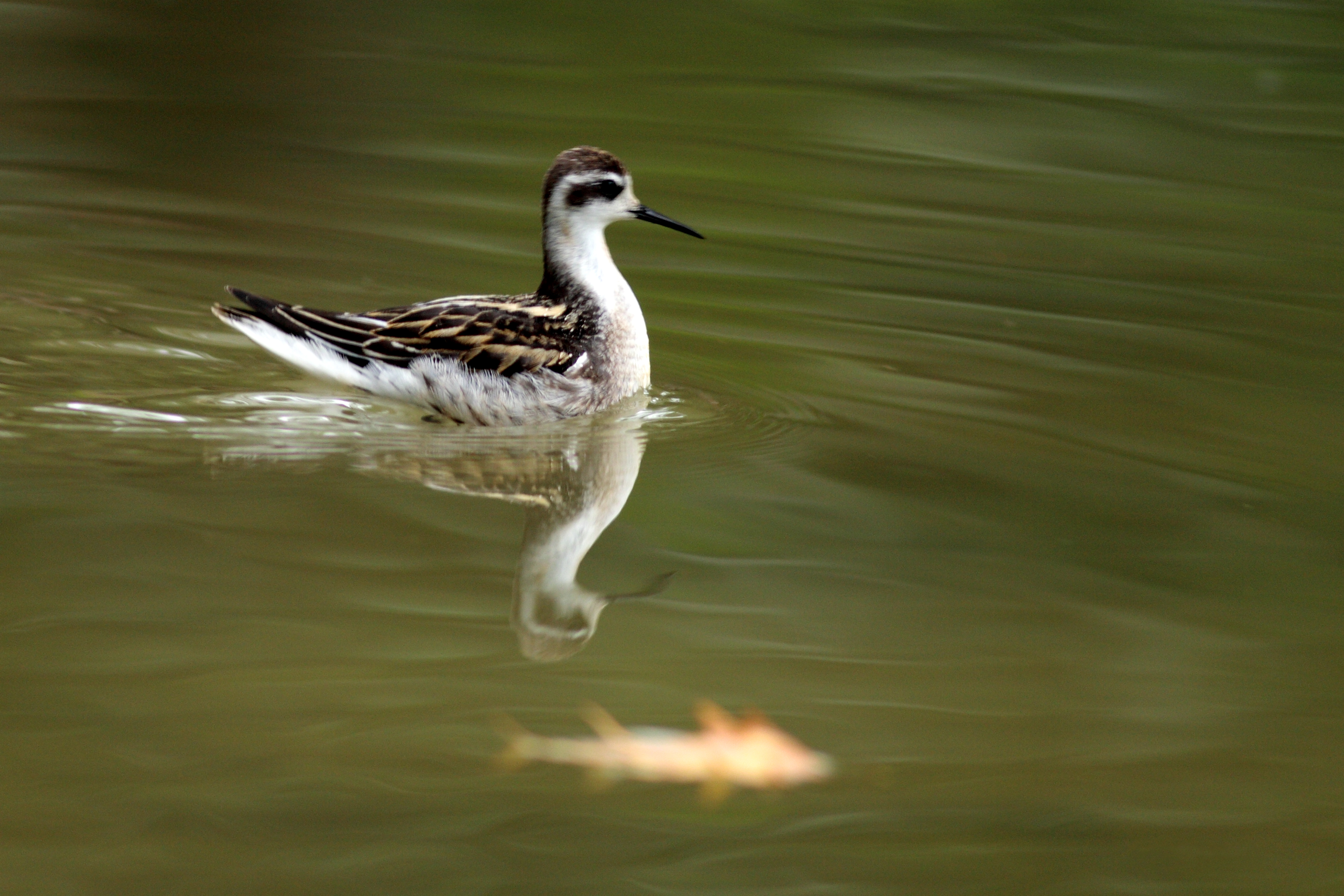 Phalarope à bec étroit que l'on peut rarement observer dans nos régions. Photo prise sur le plan d'eau du jardin public Jean Moulin à Aubagne (Bouches du Rhône) France.